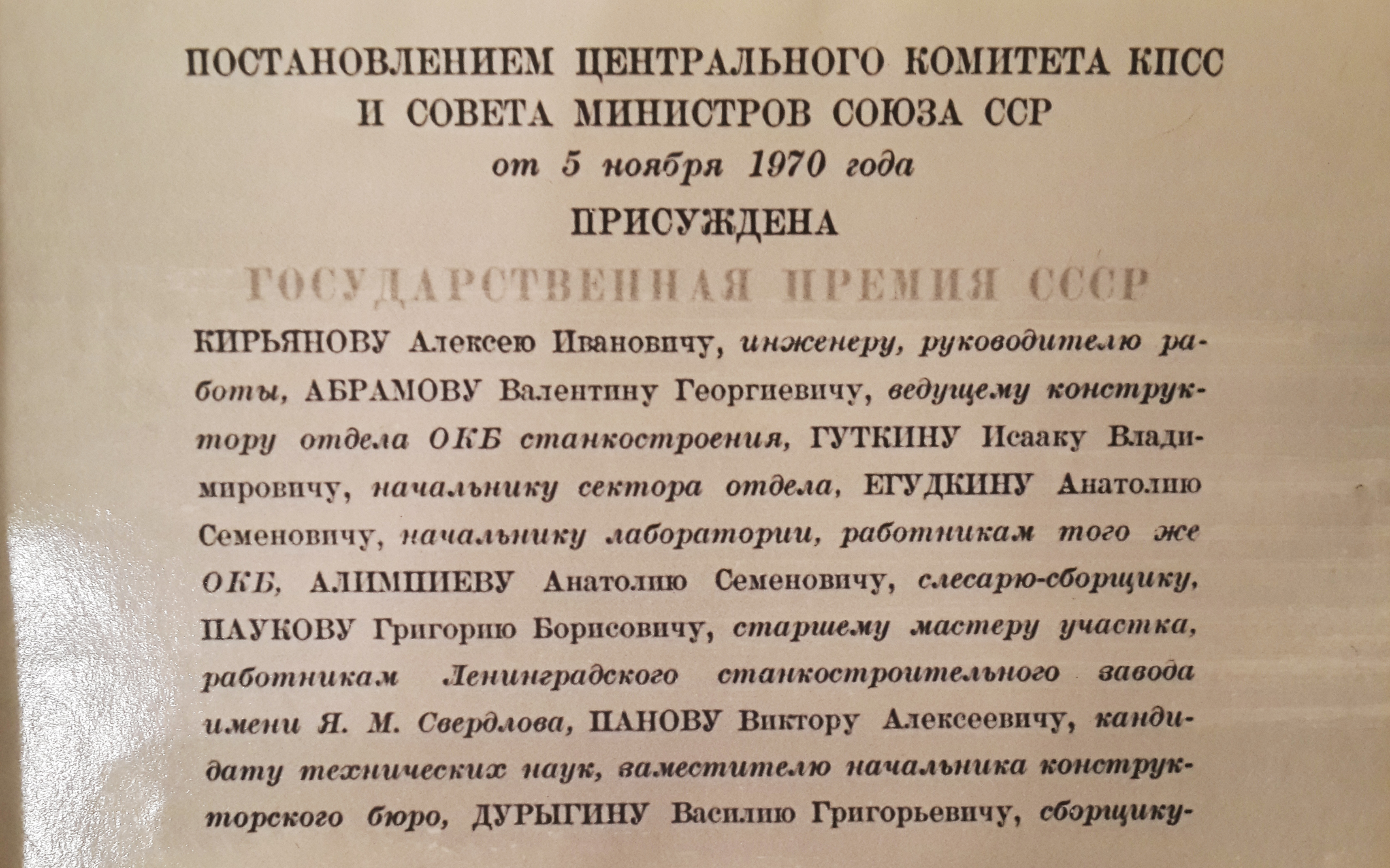 Удостоверение о присуждении Государственной Премии (лист1)